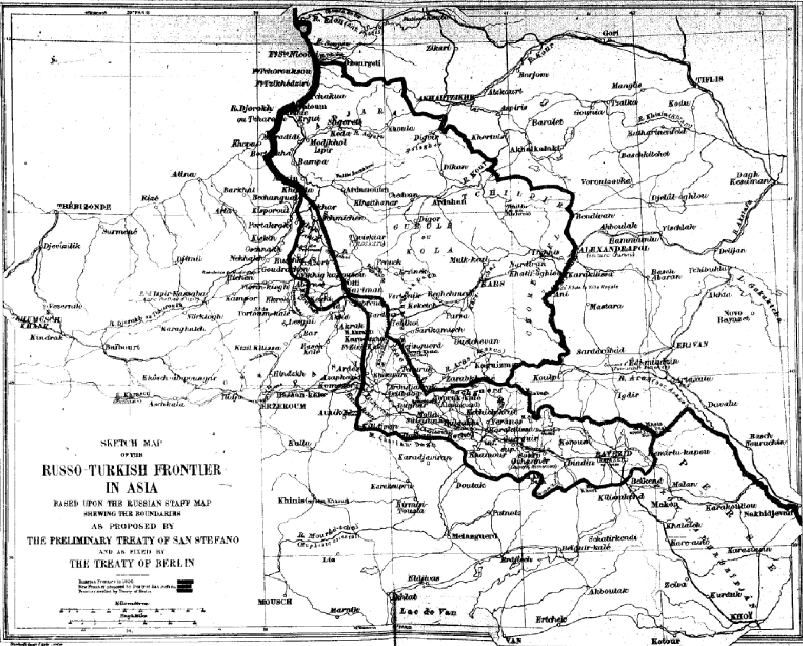 Sketch map of the Russo-Turkish frontier in Asia. According to the Preliminary Treaty of San Stefano and fixed by The Treaty of Berlin.